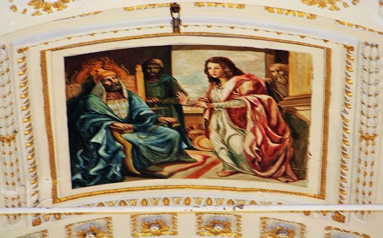 Parrocchia Maria Ss. delle Grazie - affresco